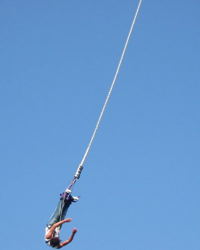 Bungee jump aan eind van de eerste val, met gestrekt koord, eigen foto